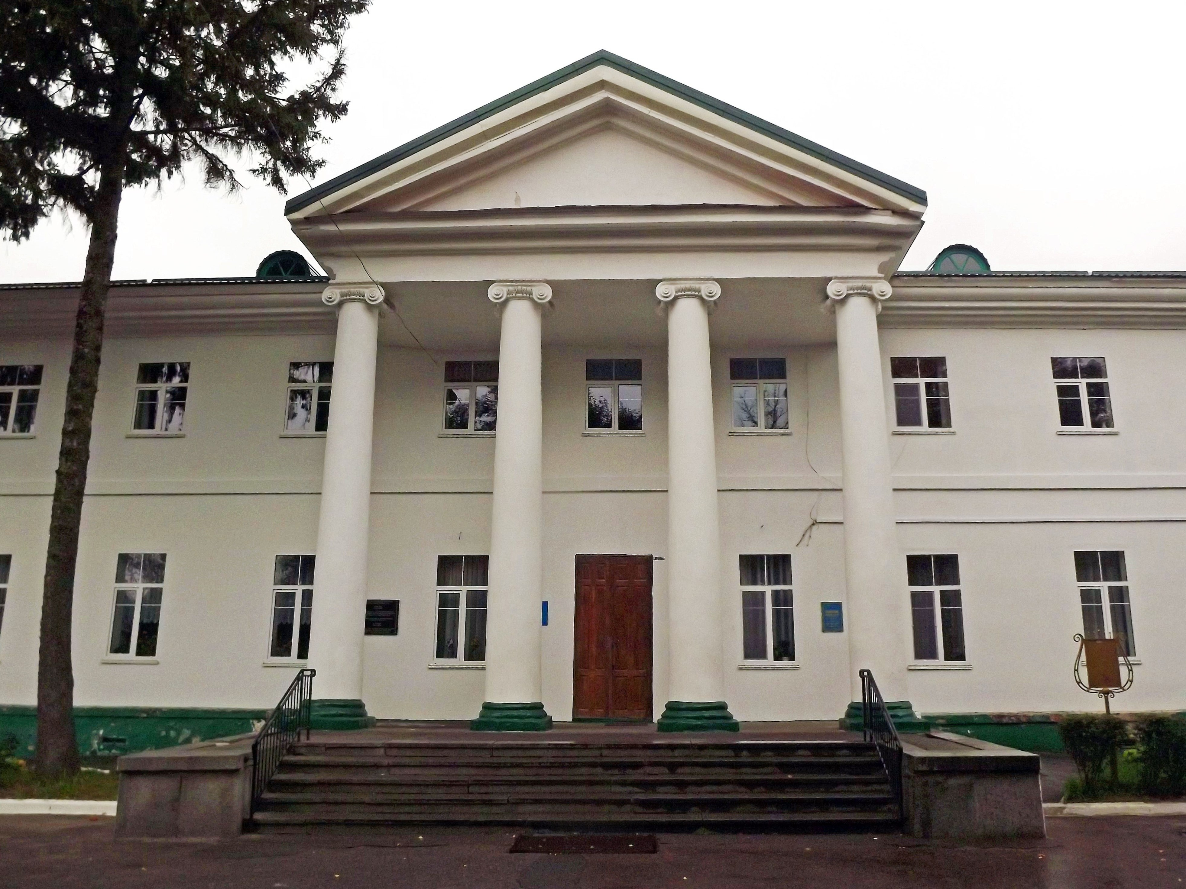 Зимовий палац (дер.), Біла Церква, бульвар 50-річчя Перемоги, 7